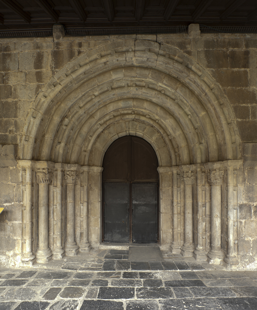 Porta del Claustre de la catedral